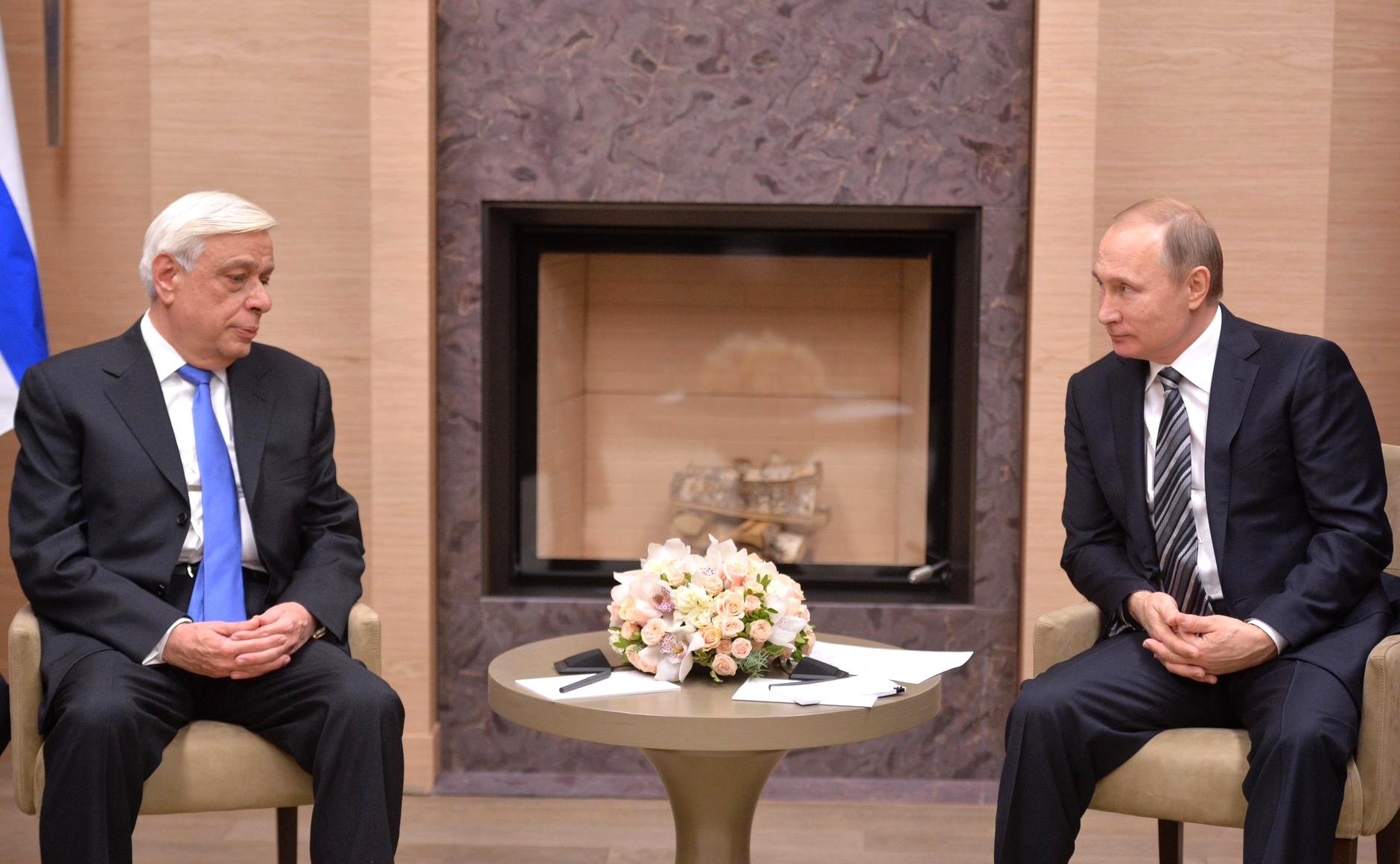 Президент России Владимир Путин с Президентом Греции Прокописом Павлопулосом